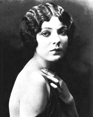 Lila Lee